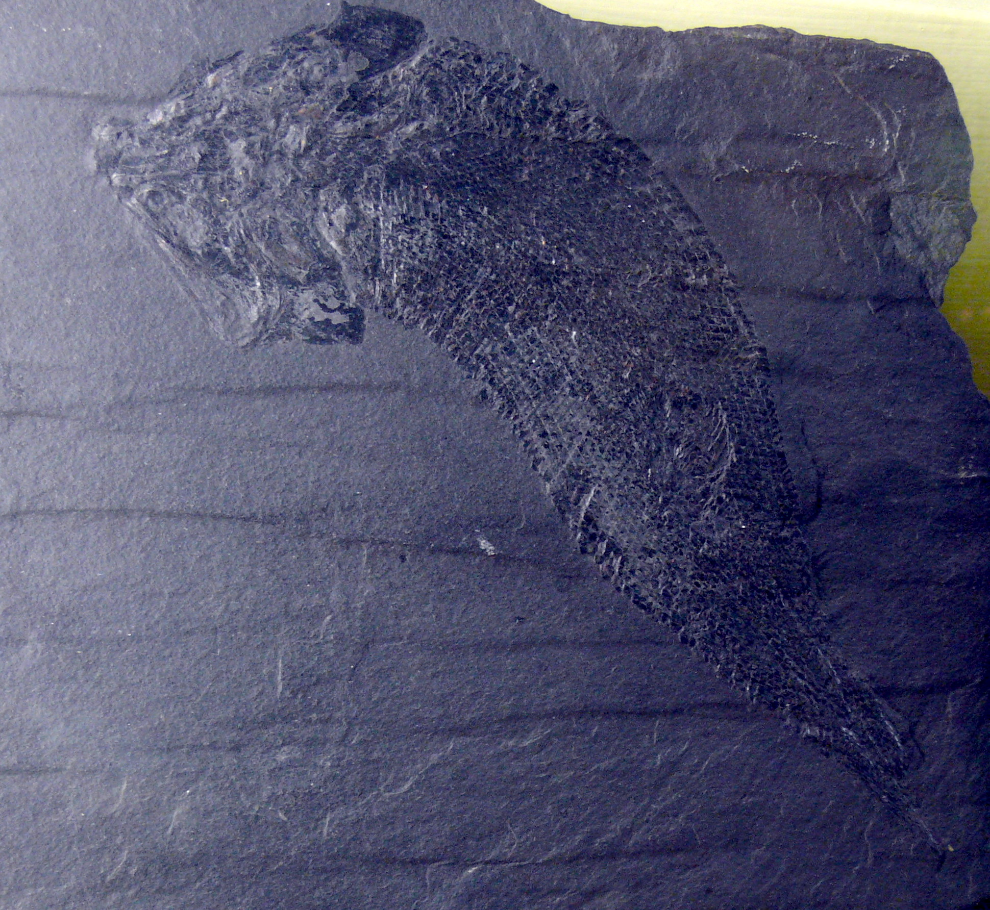 Palaeoniscus freieslebeni BLAINVILLE, Perm, Kupferschiefer, Mansfeld